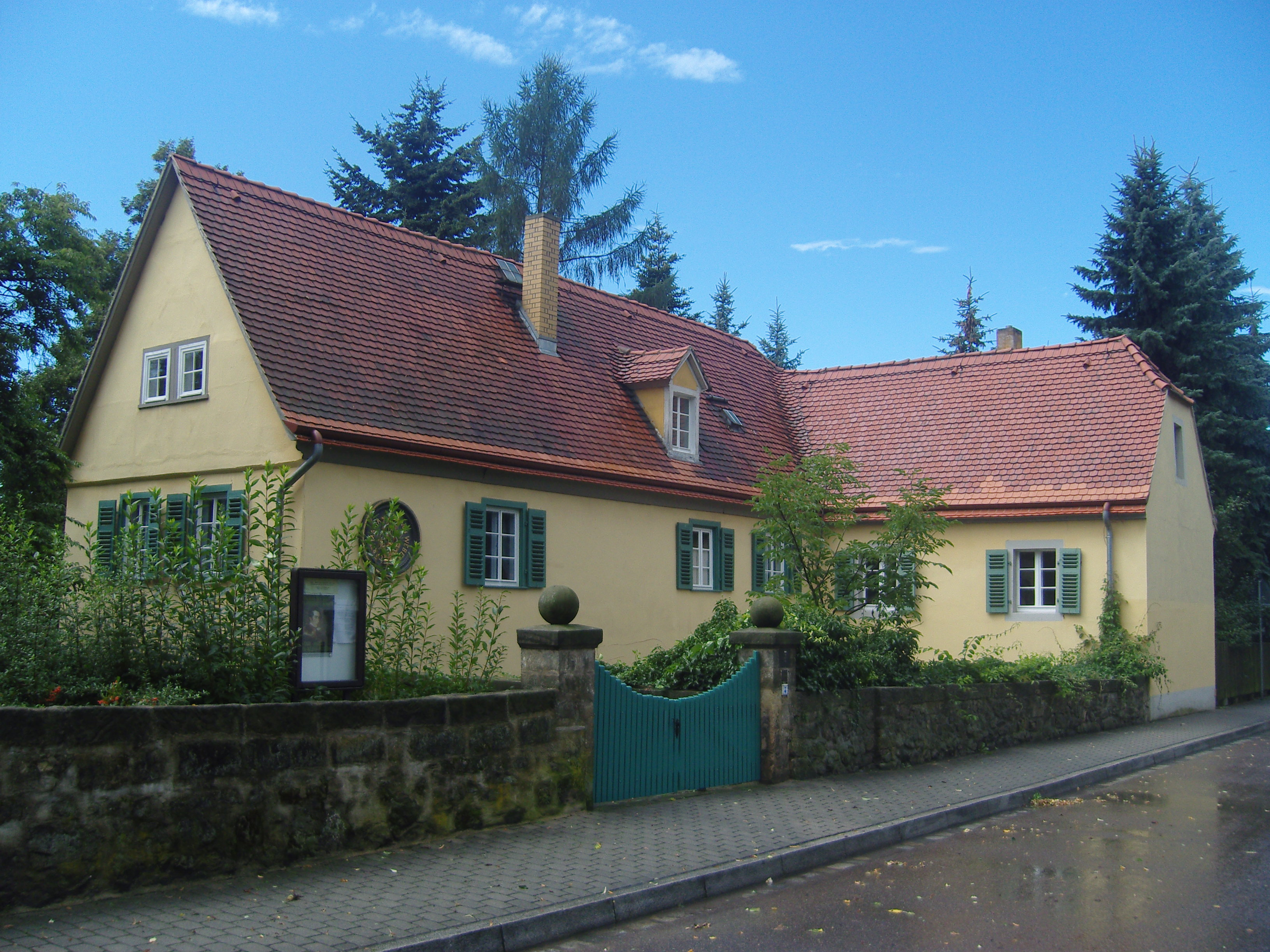 Carl-Maria-von-Weber-Museum in Dresdner Straßen in Dresden